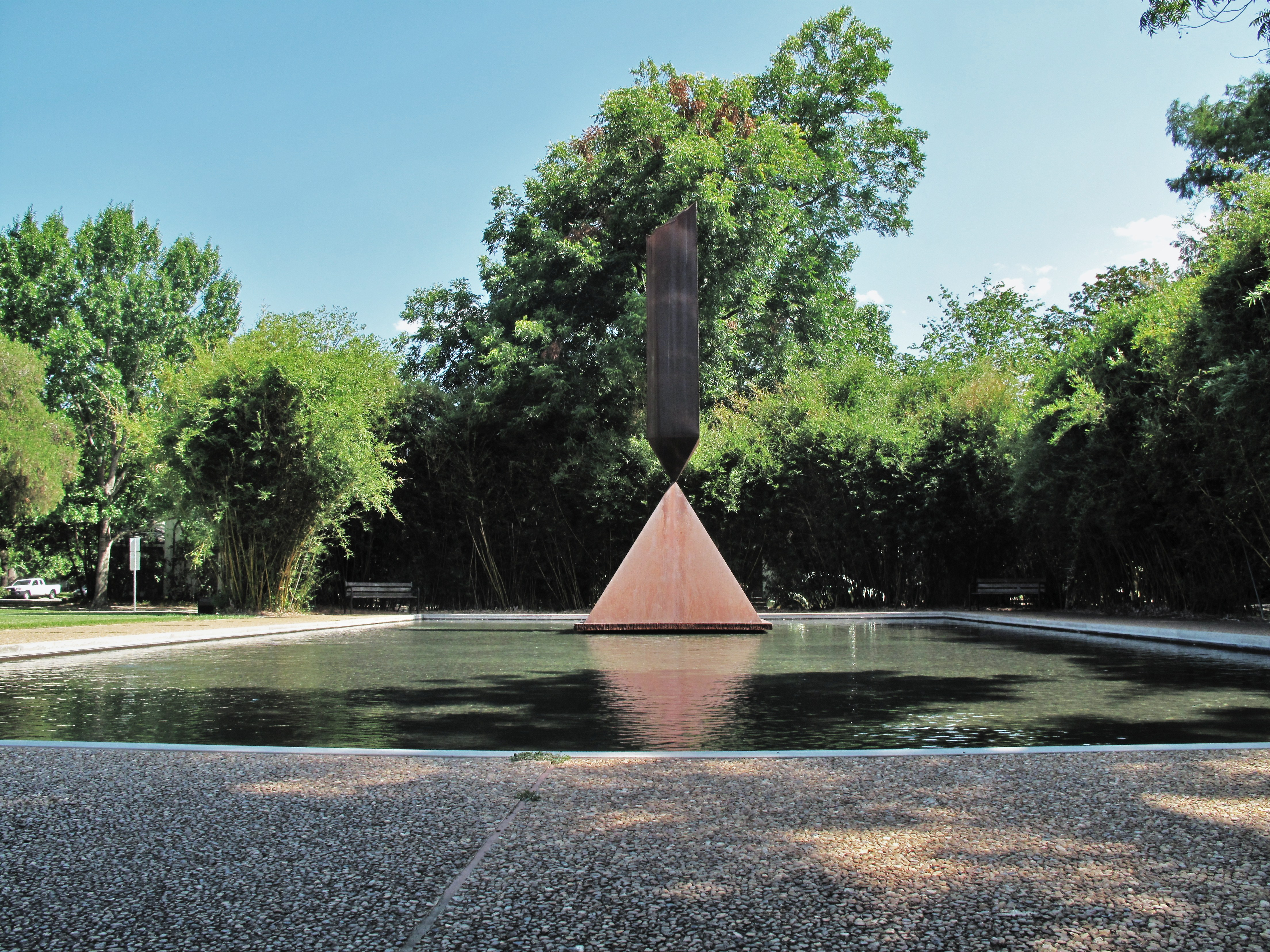 Barnett Newman